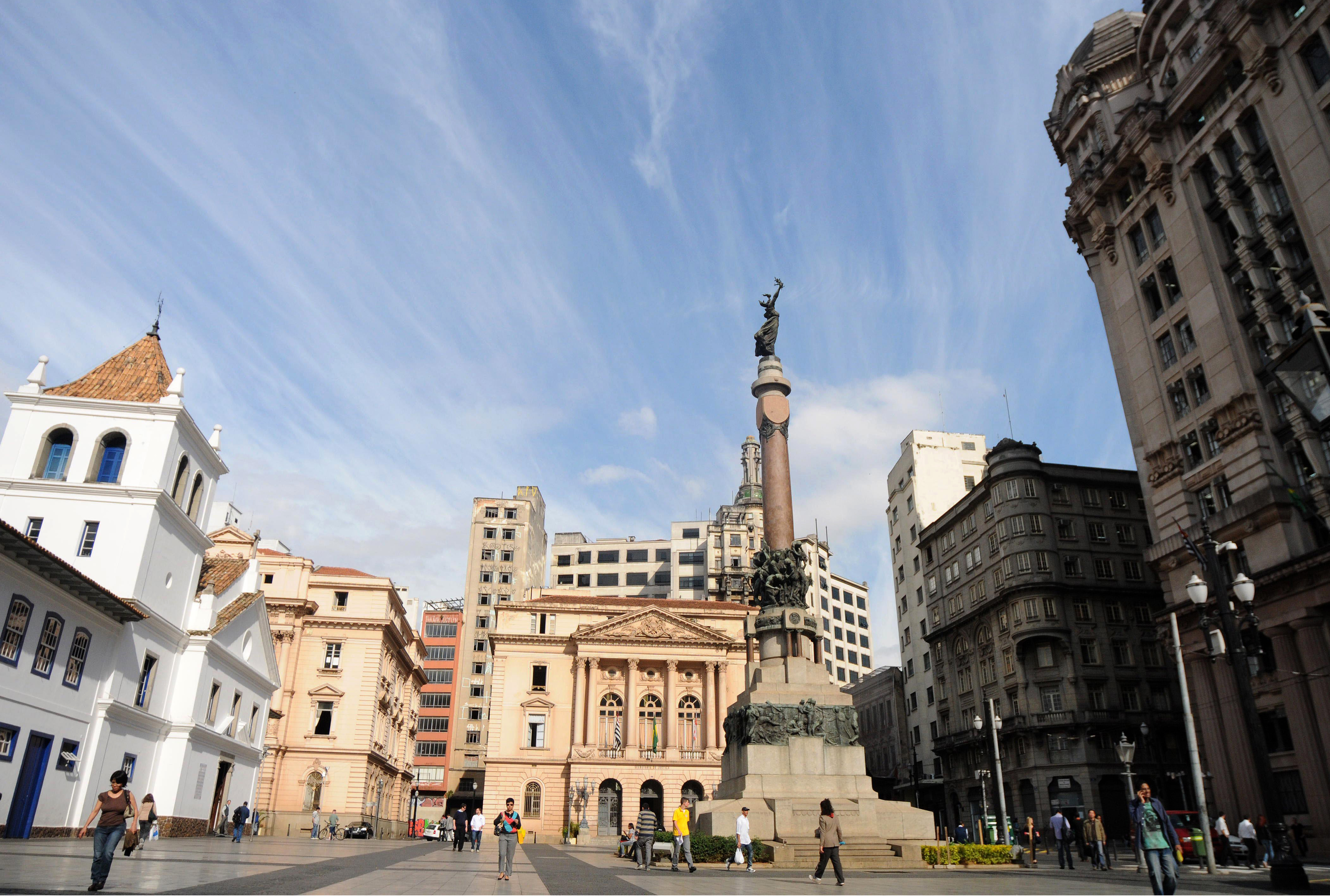 Vista do Pátio do Colégio no centro de São Paulo.